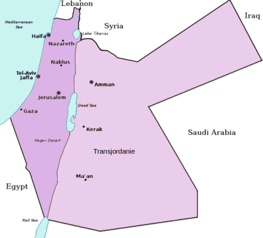 Palestine mandataire. traduit de PalestineAndTransjordan.png